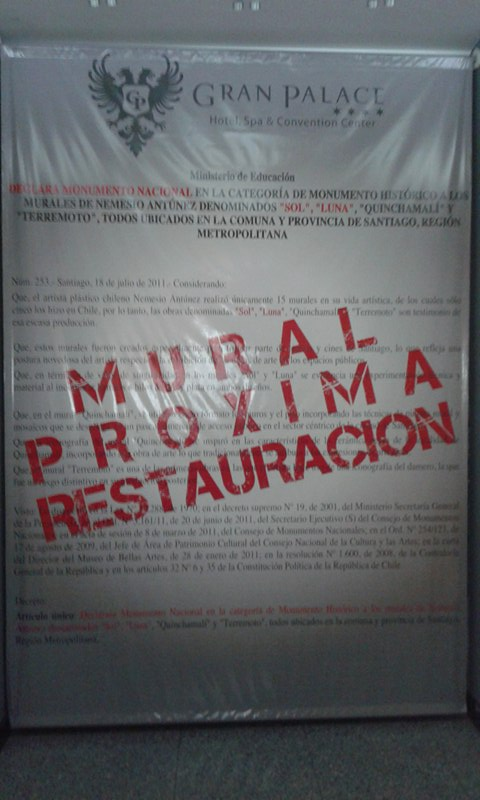 Mural luna, anuncio de restauracion